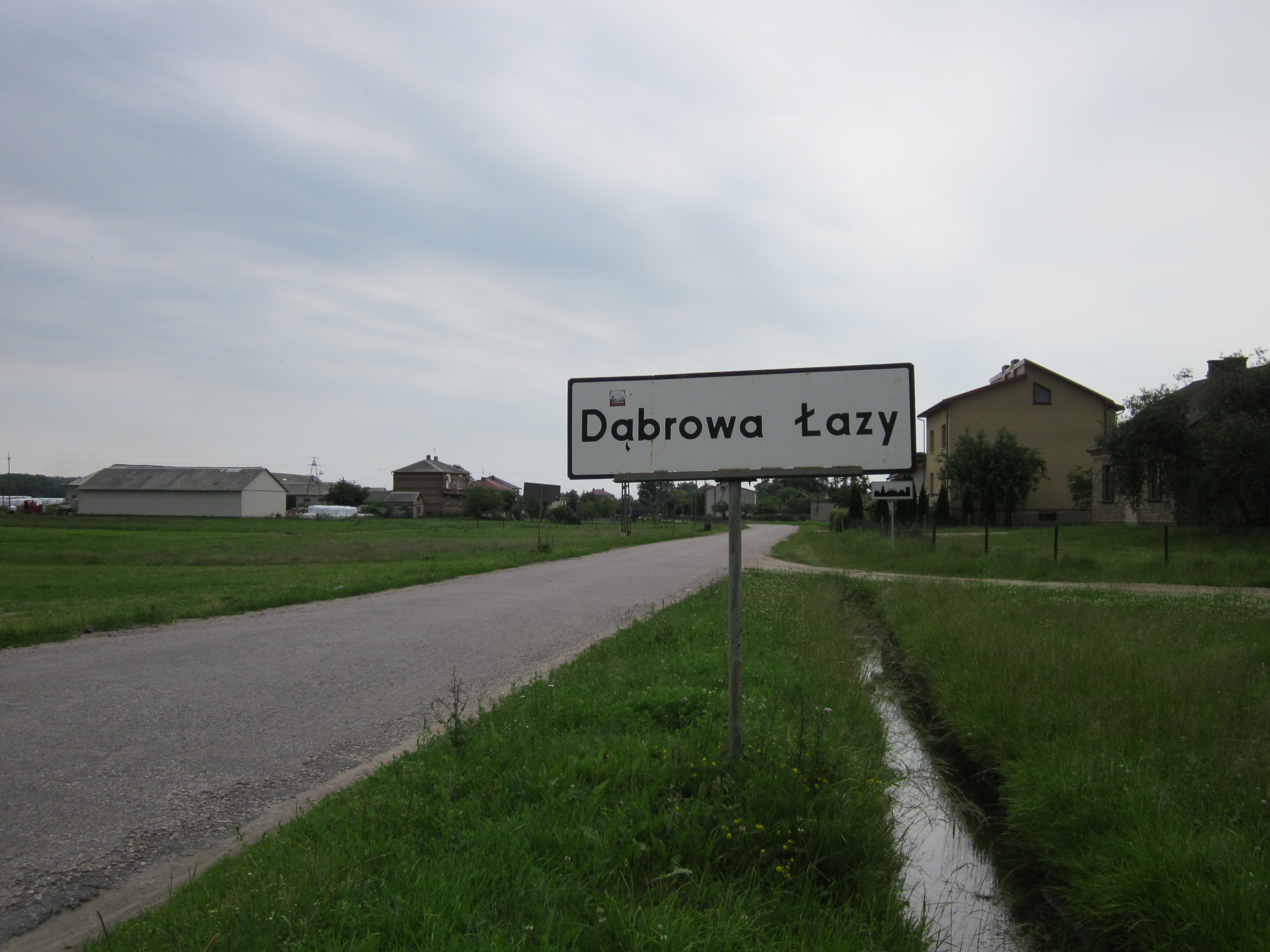 Jest to granica miejscowości od strony Dąbrowy Kaski.